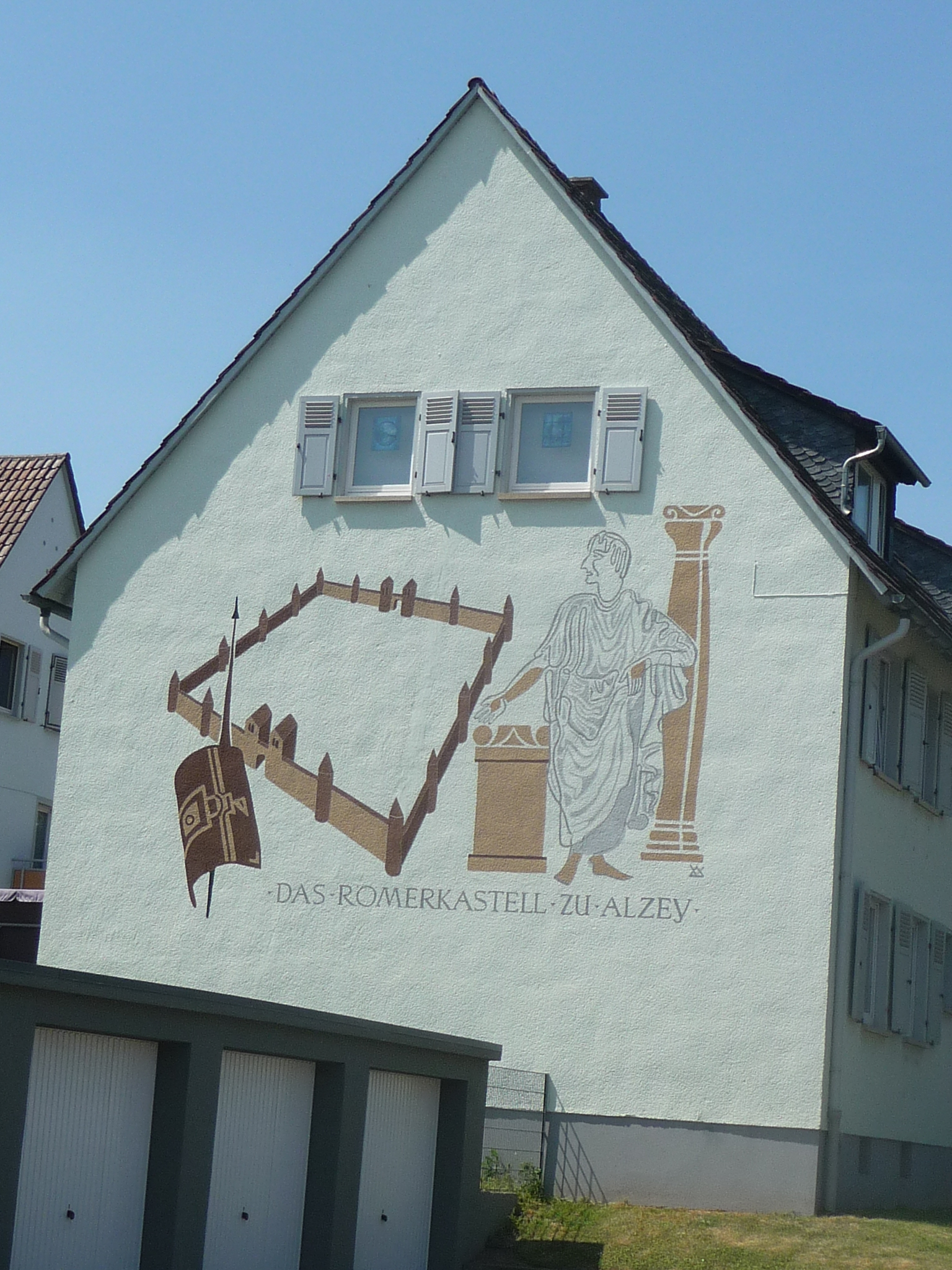 Gebäude in Alzey